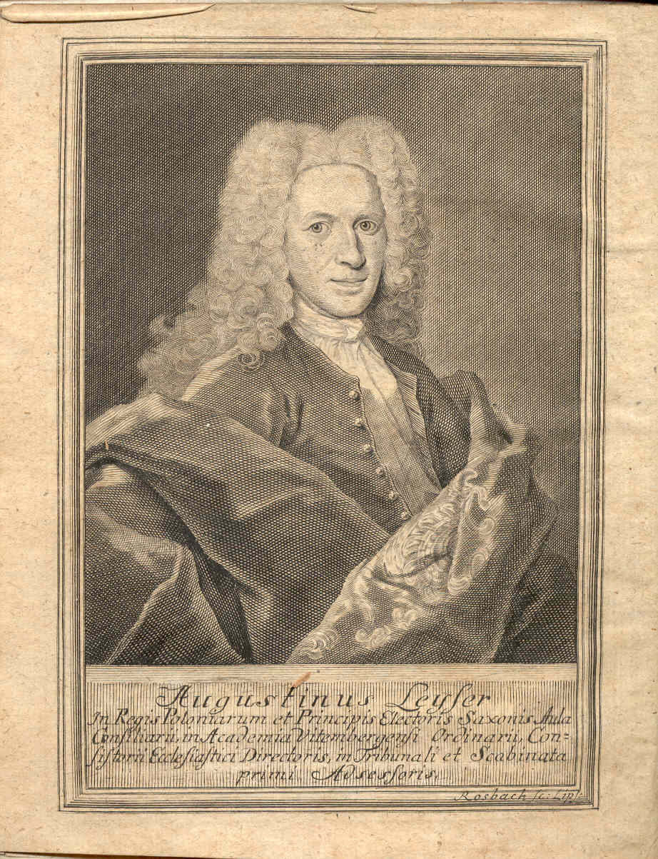 Augustin Leyser ((1683-1752) Rechtsgelehrter